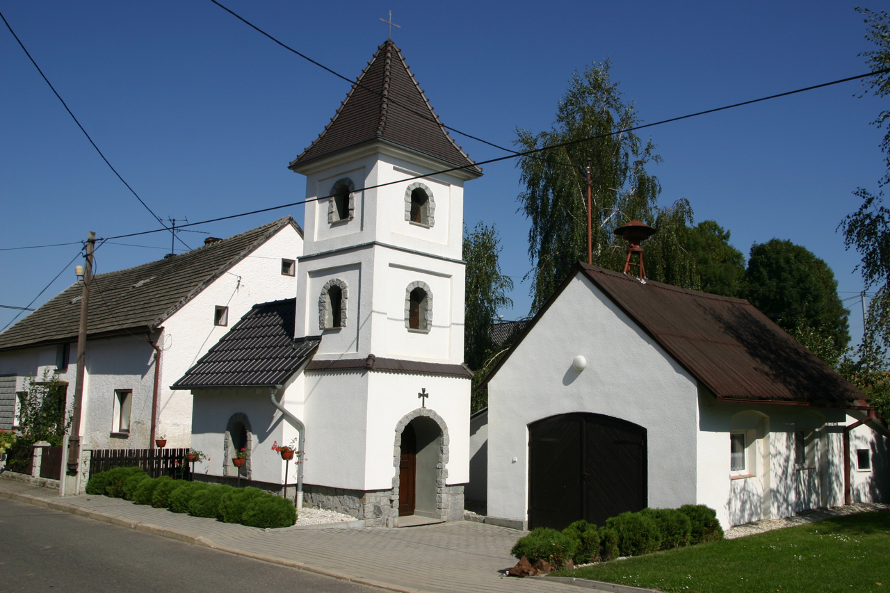 Browiniec Polski (dodatkowa nazwa w j. niem. Probnitz) – wieś w Polsce położona w województwie opolskim, w powiecie prudnickim, w gminie Biała.